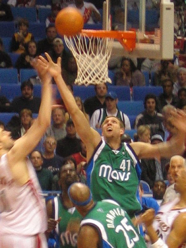 Dirk Nowitzki (#41) dei Dallas Mavericks salta al rimbalzo